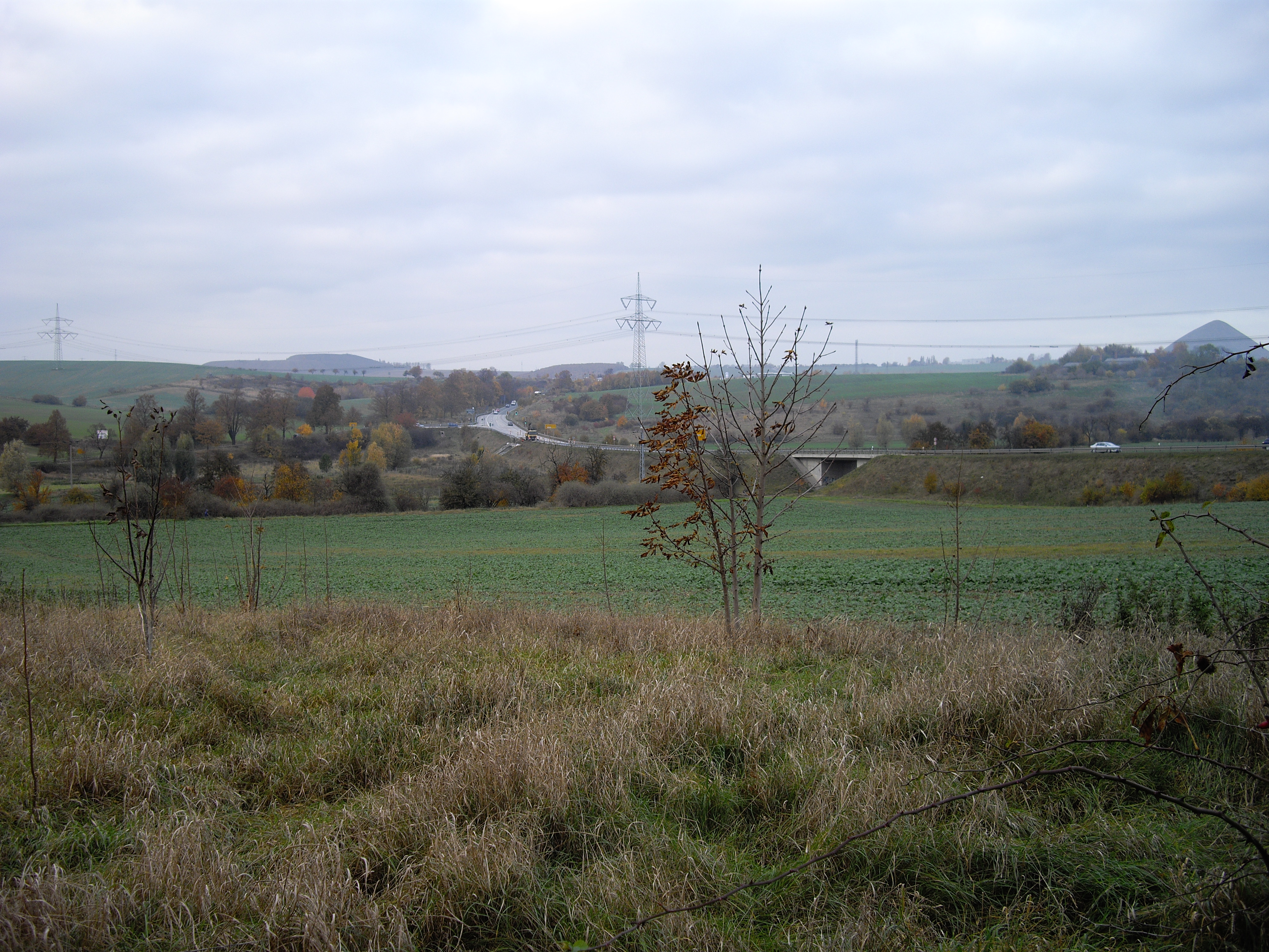 Weiter Blick auf den Faulen See und den Beginn der Ortsumfahrung Eisleben im Norden